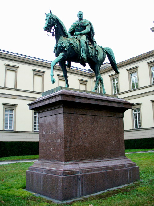 Stuttgart vor Alter Staatsgalerie Reiterstandbild König Wilhelm I (Württemberg) Konrad-Adenauer-Straße 32 von Ludwig von Hofer selbst fotografiert von user:Enslin at 5 Januar 2006 in Stuttgart "Mir brauchet koi Kunscht. Mir brauchet Grombiere." Dieser Spruch steht heute gleich in vier Sprachen (Schwäbisch, Hochdeutsch, Englisch und Französisch) auf dem Standbild vor der Alten Staatsgalerie.